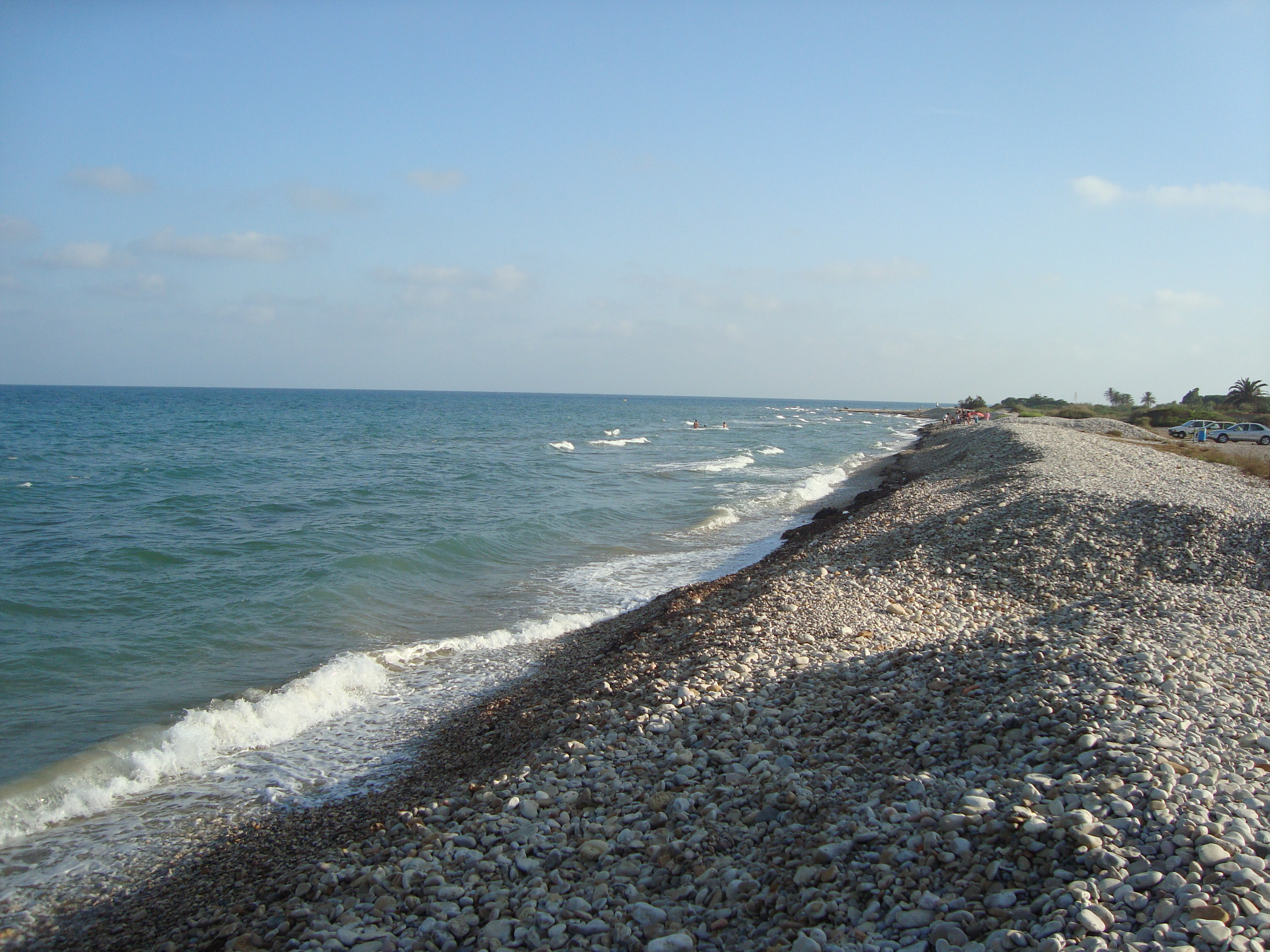 Platja del Serradal